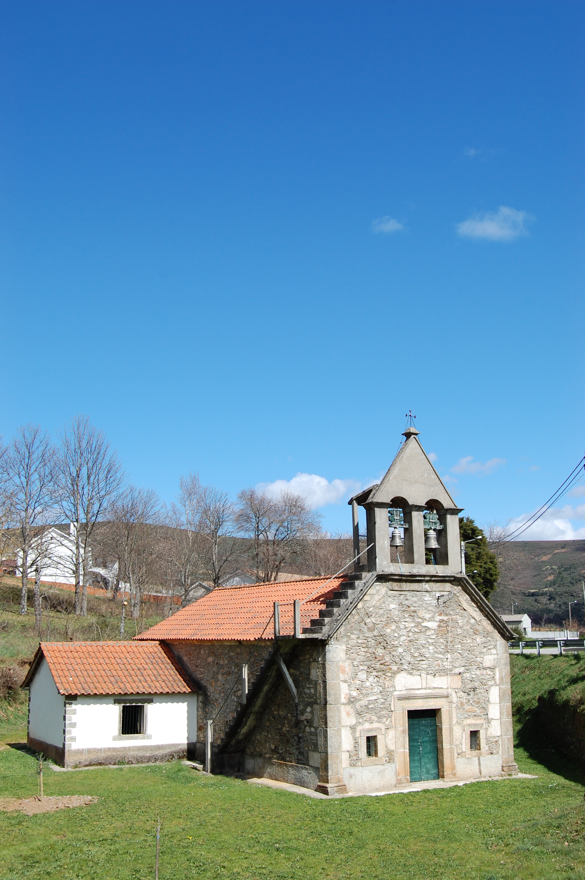 Capela de Nossa Senhora da Ponte na freguesia de França, concelho de Bragança, Portugal.